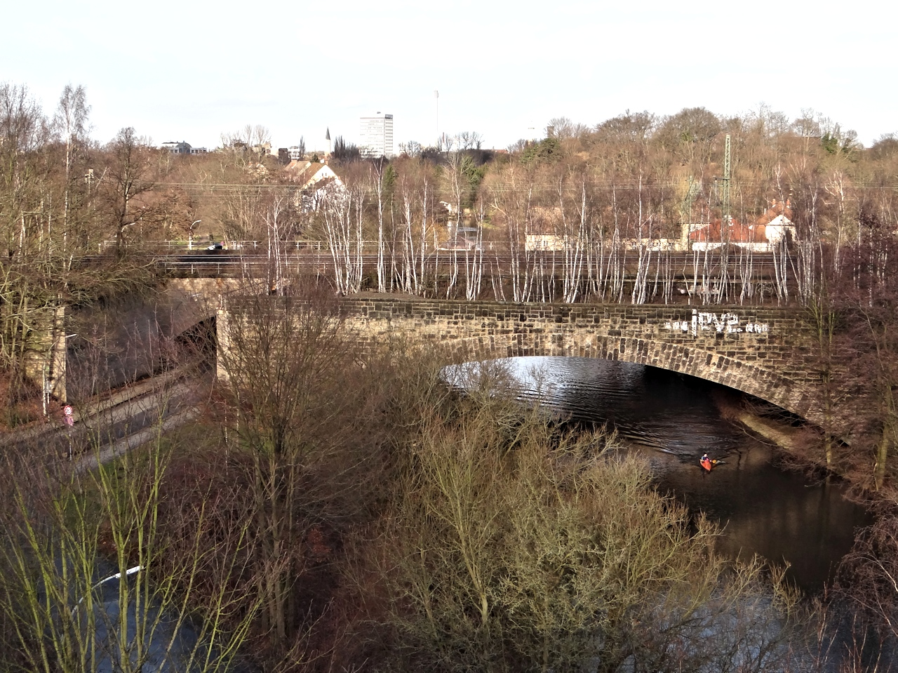 Eisenbahnbrücken Nord beim Eisenbütteler Wehr 2014, im Vordergrund die aufgegebene Brücke aus dem Rangierbereich, im Hintergrund die Brücke der Bahnstrecken Braunschweig-Harzburg und Braunschweig-Hannover.